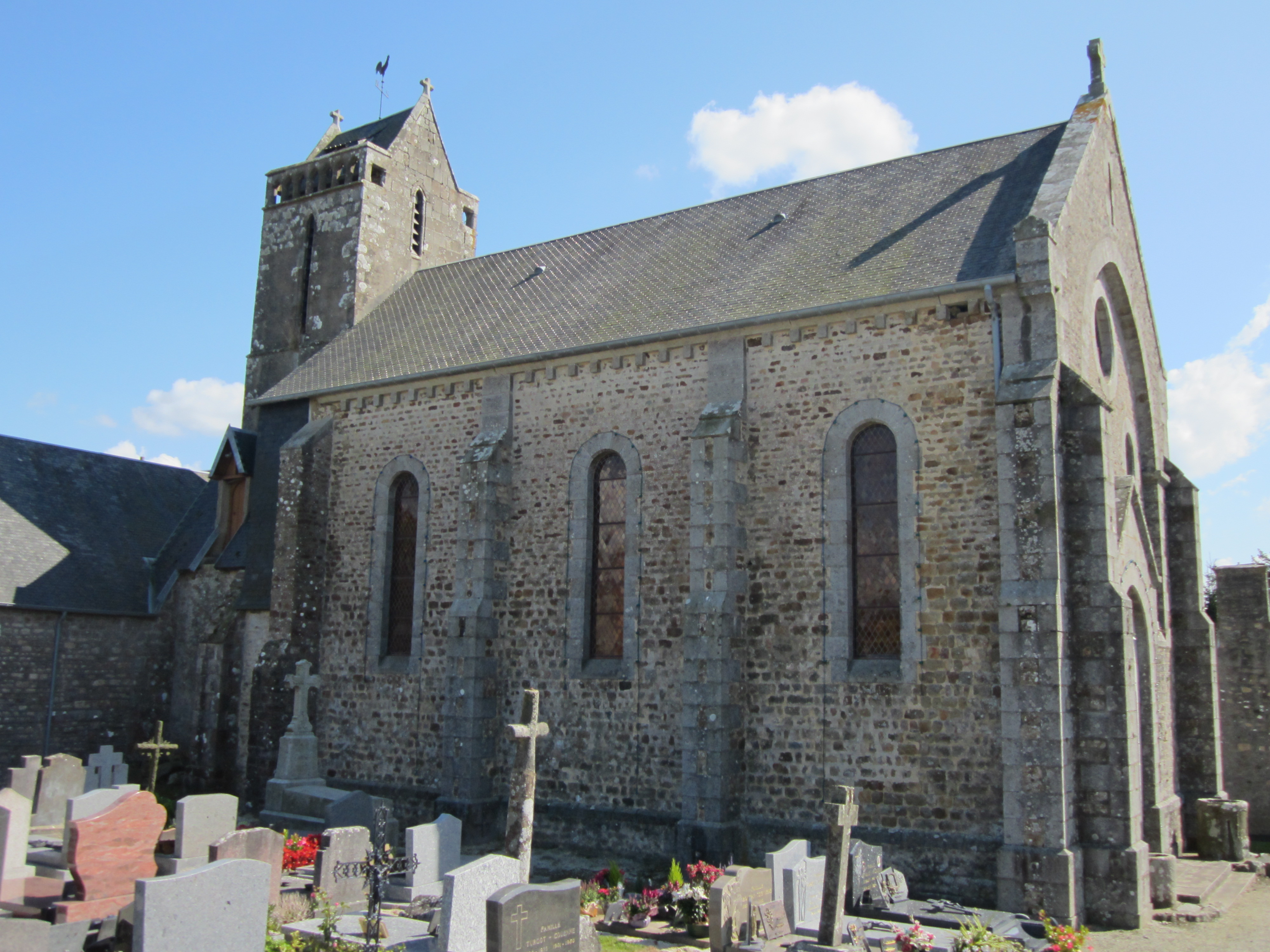 Subligny, Manche